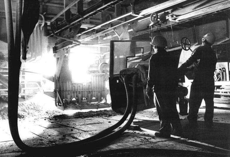 ADN-ZB-Lehmann-11.11.83-Ldg-Bez. Halle: Karbidproduktion-VEB Chemische Werke Buna - traditioneller Karbidproduzent unserer Republik. Einheimische Rohstoffe, Kalk und Koks, werden im Lichtbogen bei 2000 Grad Celsius zu dem volkswirtschaftlich wichtigen Karbid verschmolzen. Die Kumpel stechen das Karbid ab. - siehe auch 1983-1111-24N